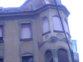 Casa.1925 - 1930.